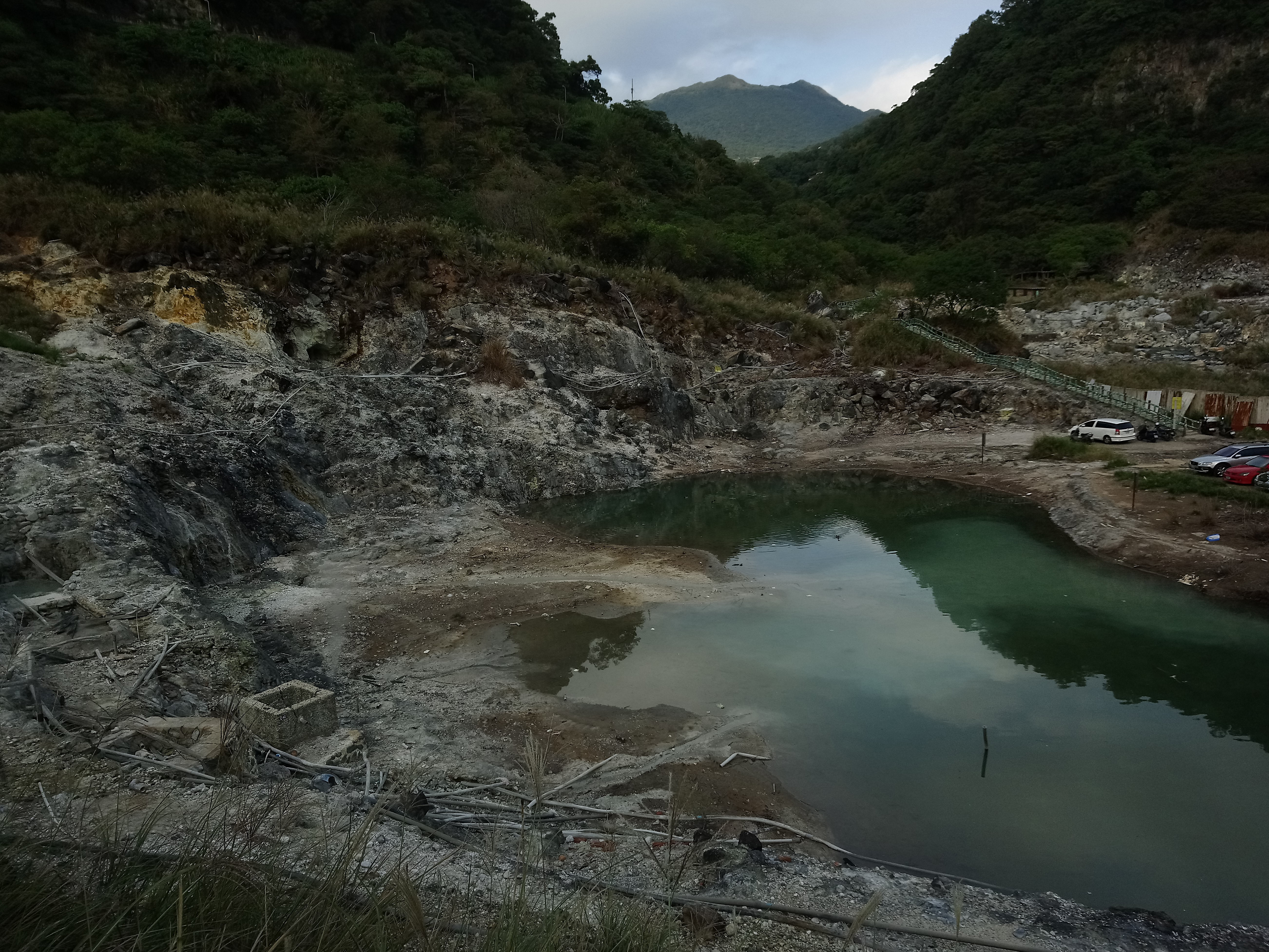 龍鳳谷地熱景觀區,臺北市北投區石牌次分區永和里